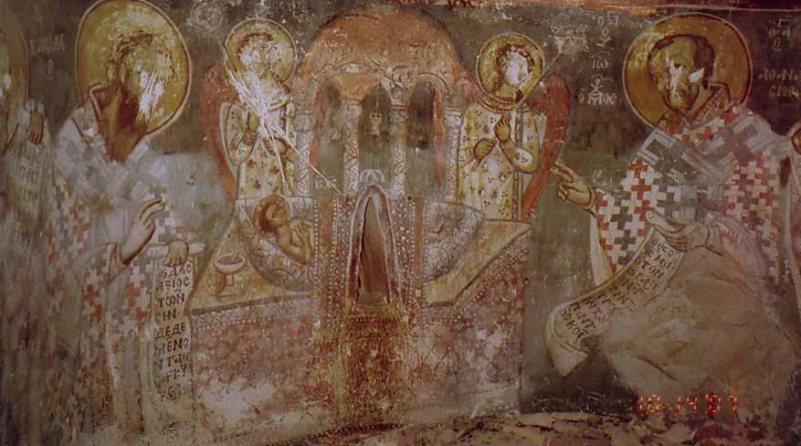 Мелисмос, црква Богородица Пречиста во битолско Граешница